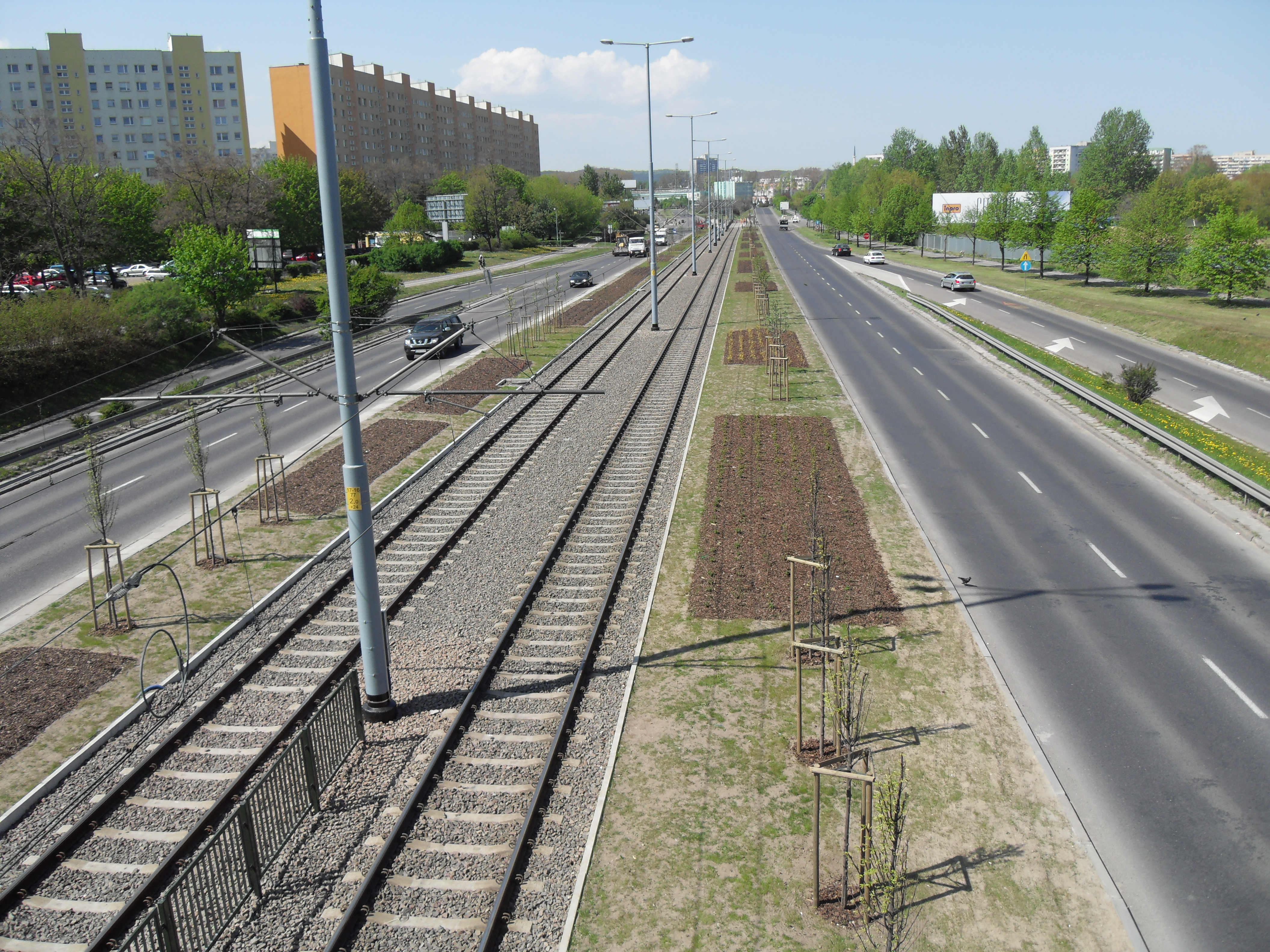 Gdańsk Zaspa, al. Rzeczypospolitej (widok w kierunku północnym).